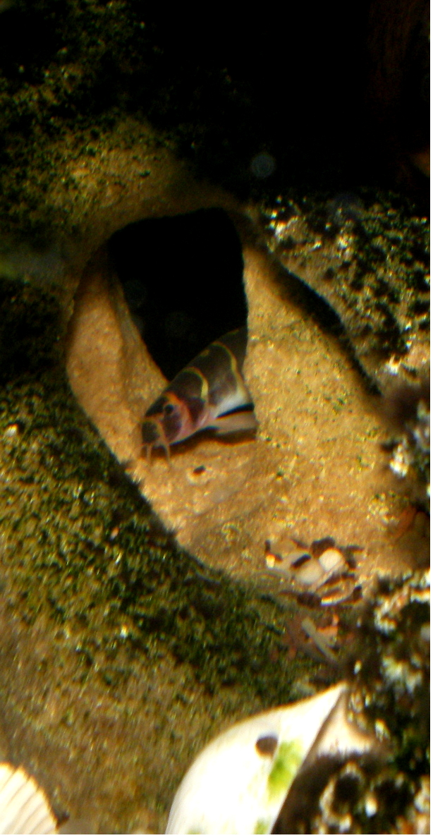 Ciernioczek Kuhla, Pangio kuhlii